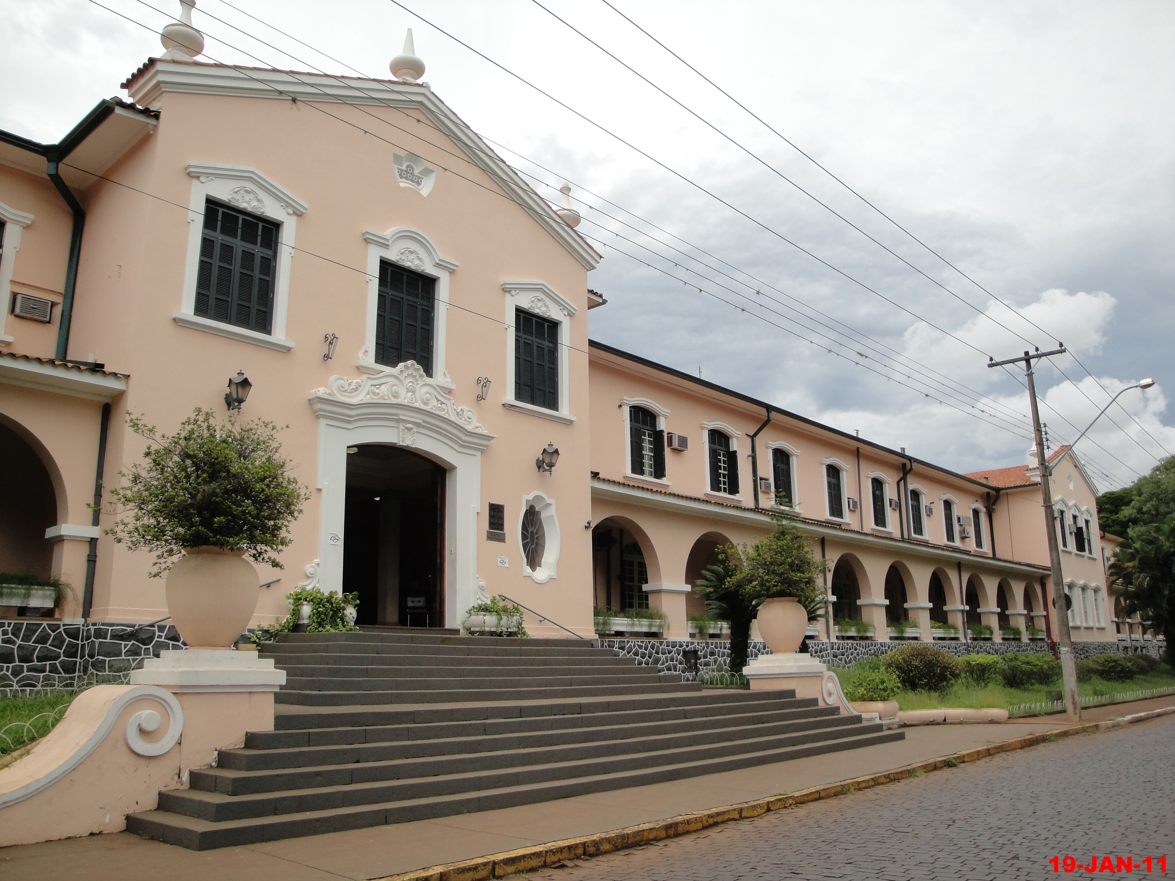 Faculdade de Medicina de Ribeirão Preto - Prédio Central no Campus da USP